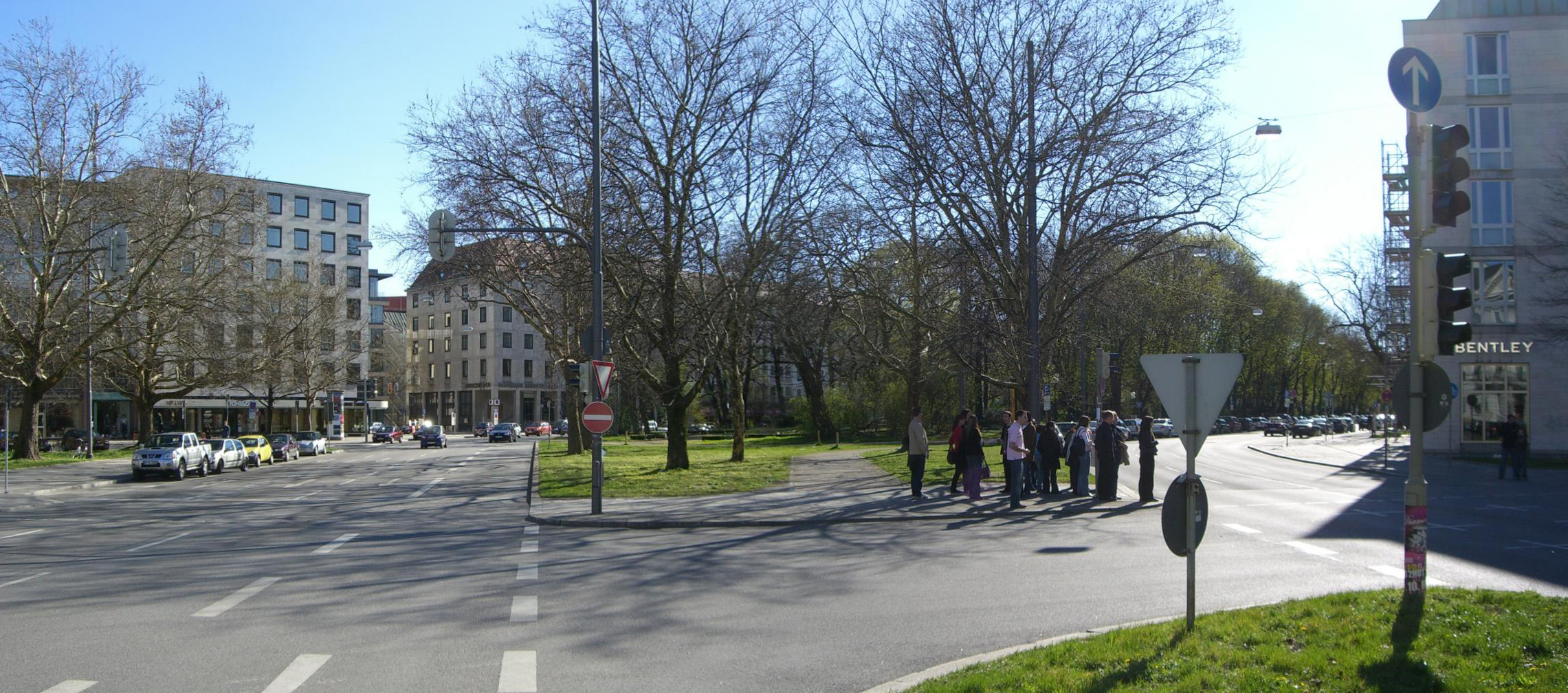 München: Altstadtring (Maximiliansplatz)